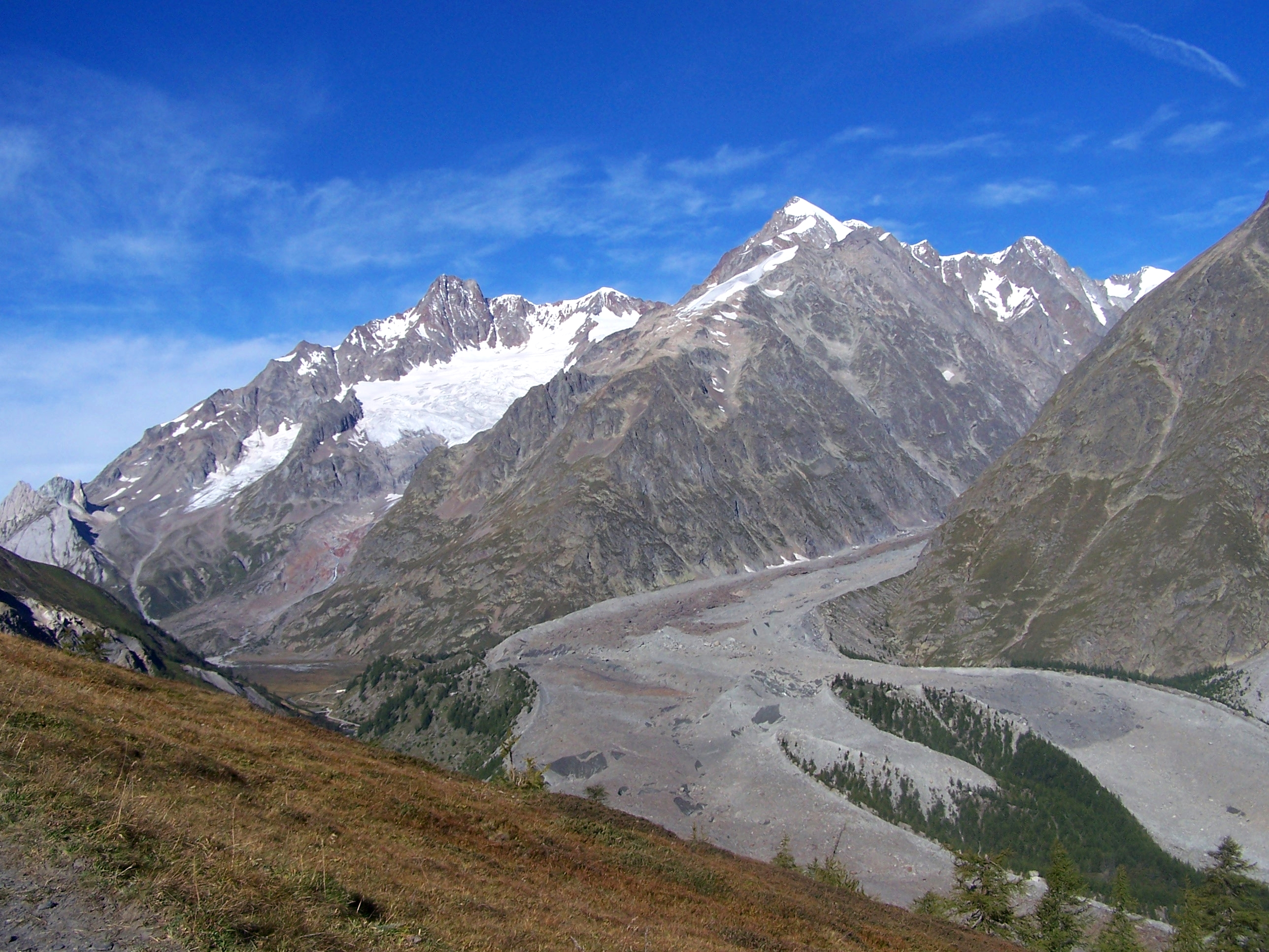 Miagegletscher im Montblanc-Massiv (italienischer Teil). Links über dem Gletscher im Hintergrund die Aiguilles des Glaciers, rechts als höchster Gipfel die Aiguille de Tré-la-Tête.